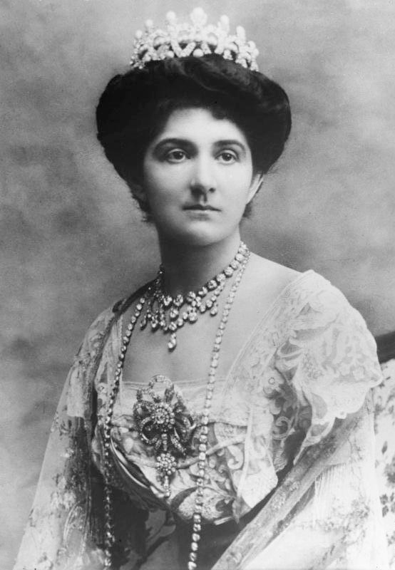 Title: * Elena von Montenegro Extra information: Porträt Prinzessin Elena von Montenegro, Königin von Italien und Albanien, Kaiserin von Äthiopien, Frau von Viktor Emanuel III. People in the image: Montenegro, Elena von Prinzessin: Königin von Italien und Albanien, Kaiserin von Äthiopien, Italien# Additional information: *